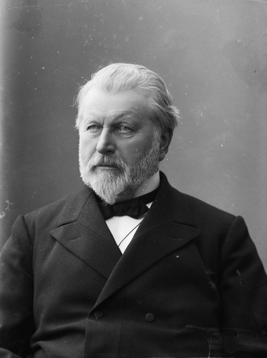 Johannes Steen (1827–1906), rektor og statsminister (V).